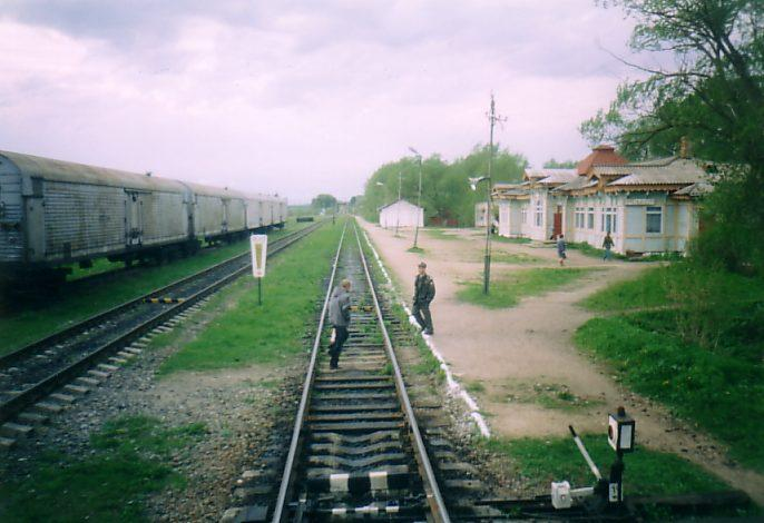 Станция Красный Холм (Октябрьская ЖД)